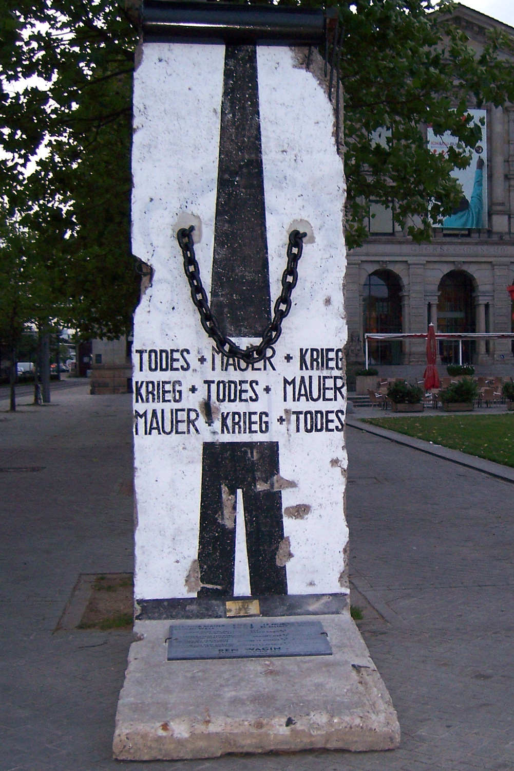 Fragment der Berliner Mauer: „Mahnmal gegen Krieg und Gewalt“. Standort: Platz der Deutschen Einheit (zwischen Bahnhofsvorplatz und Überseemuseum). Material: Stahlbeton. Gestaltung: Ben Wagin. Einweihung: 28. September 2010. Dauerleihgabe von Friedel Drautzburg und Harald Grunert.